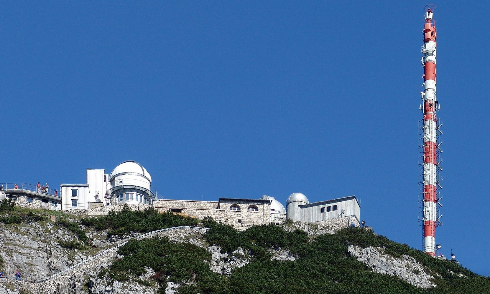 Das Wendelstein-Observatorium der LMU München und der alte Sendemast des BR auf den Wendelstein